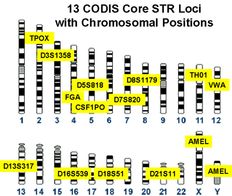 CODIS 13 point profile